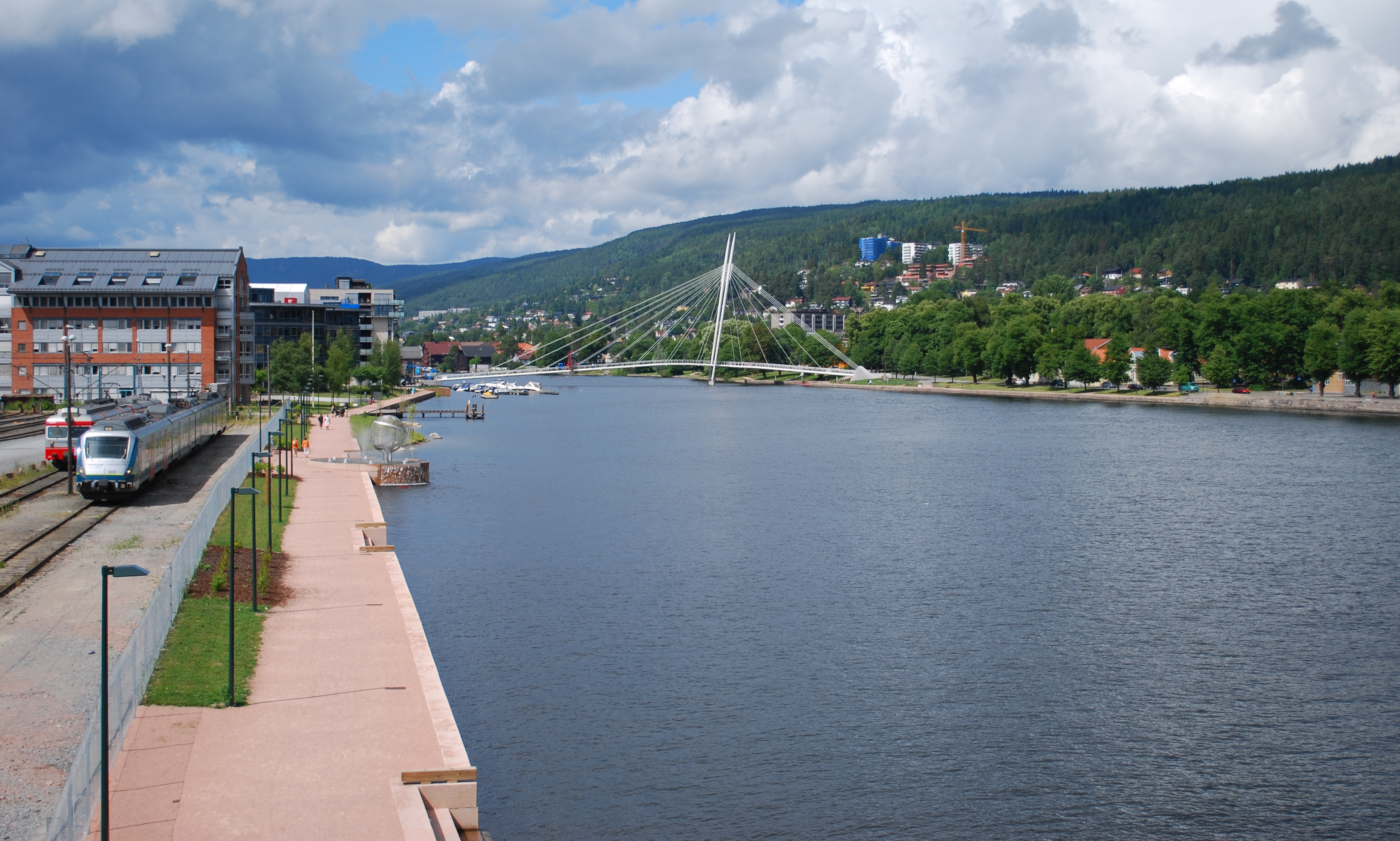 Drammenselva med ny promenade og broen Ypsilon